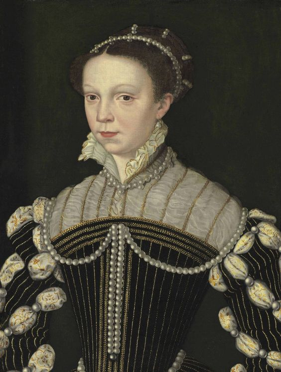 ესპანეთის დედოფალი და საფრანგეთის პრინცესა ელიზაბეტ ვალუა